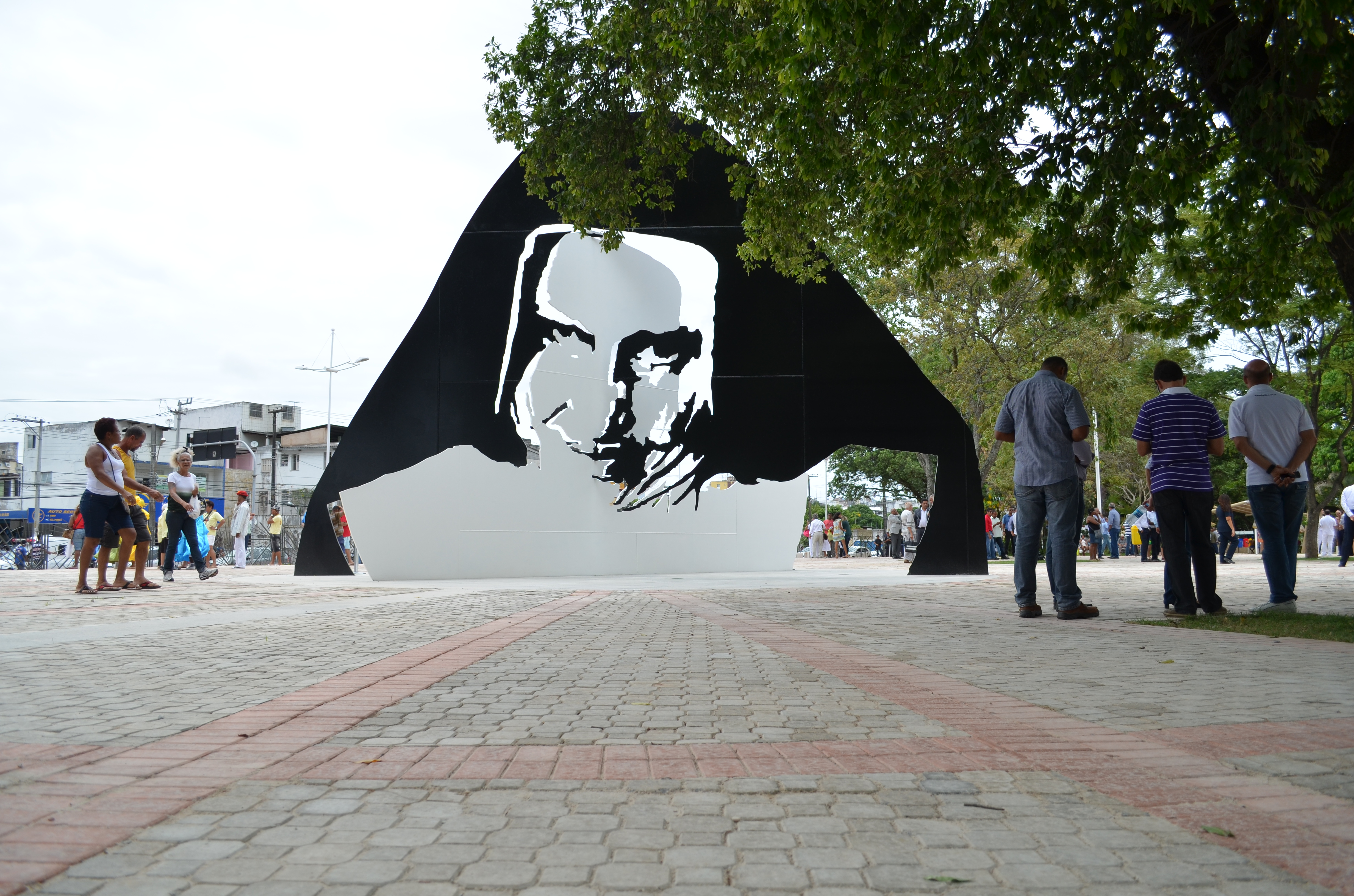 Largo de Roma.